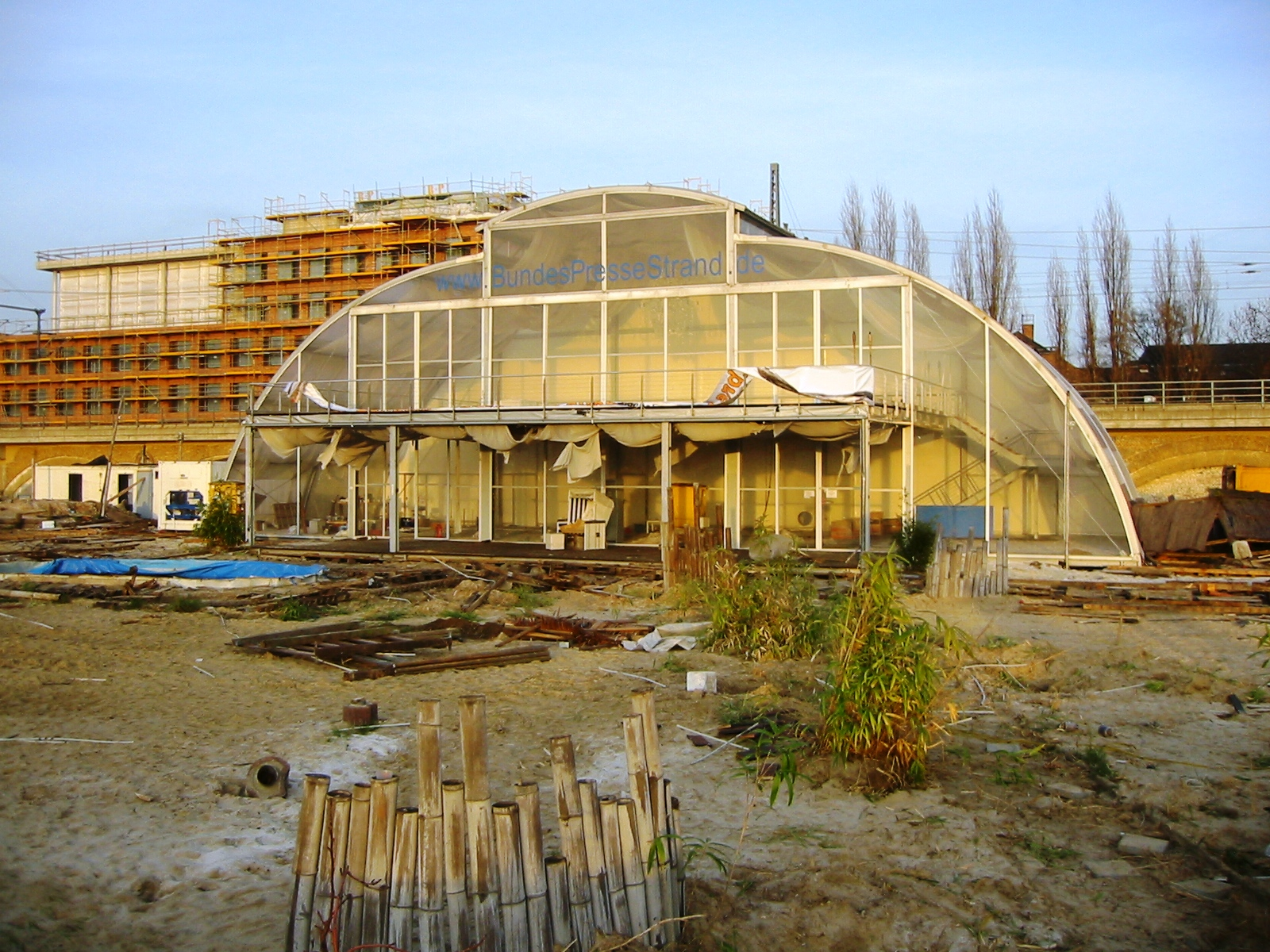 Ehemaliger BundesPresseStrand im Dezember 2011 nach dem Verkauf der Einrichtungsgegenstände